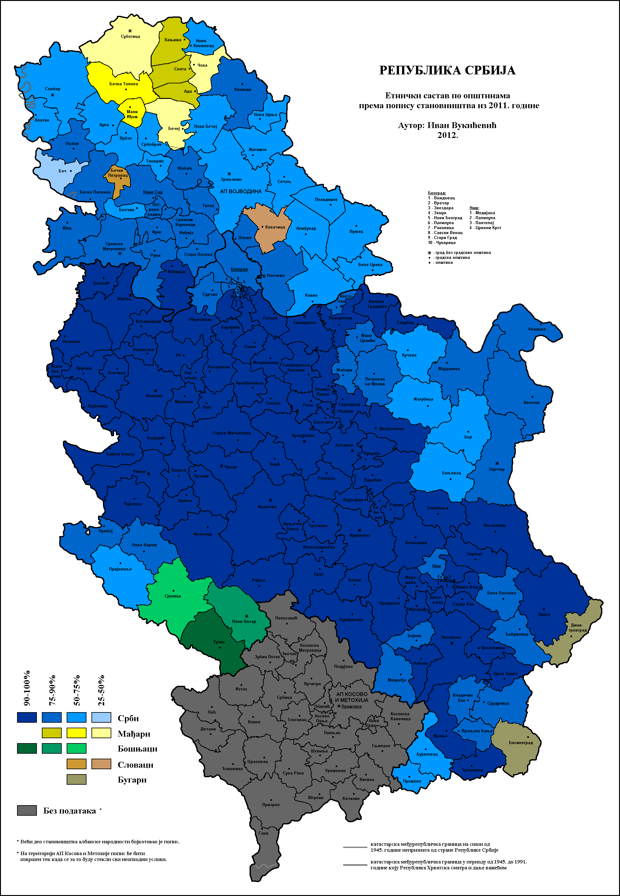 Етнички састав Србије по општинама 2011. године. Аутор: Иван Вукићевић